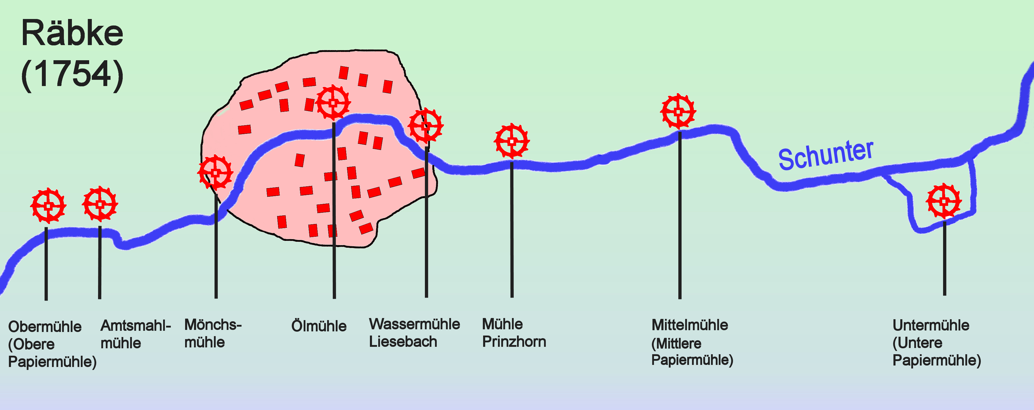 Mühlen an der Schunter bei Räbke, Zeichnung nach der Braunschweigischen General-Landesvermessung von 1754